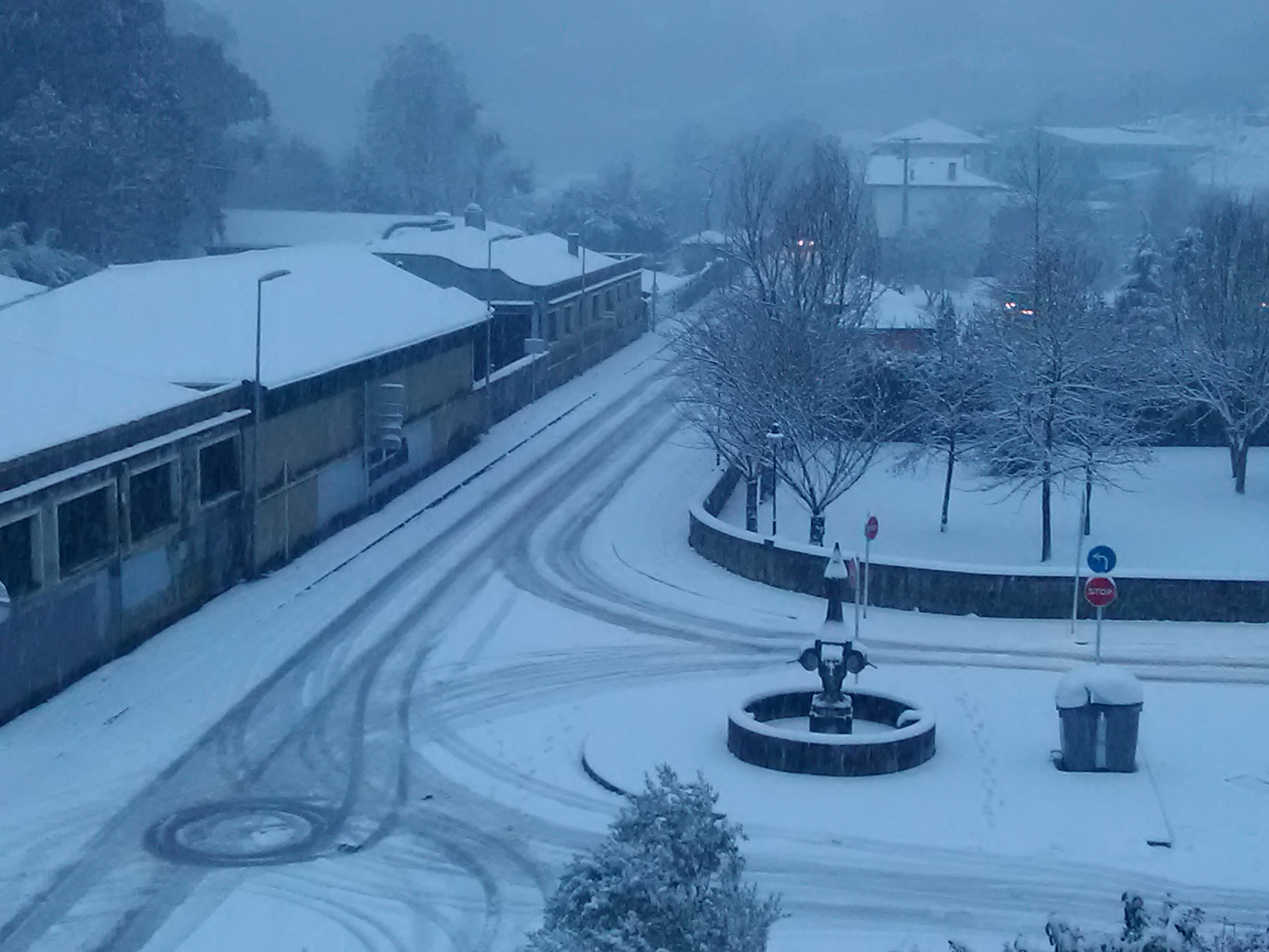 Mandaska izeneko iturria, Lekeitioko herrirako sarreran.